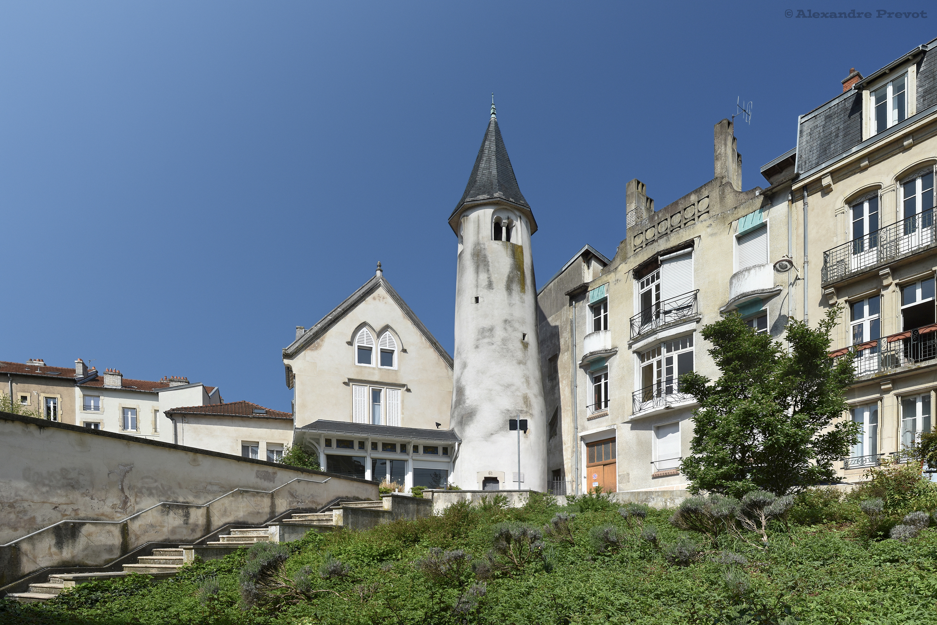 Tour de la Commanderie Saint-Jean-du-Vieil-Aître, impasse Clérin à Nancy (France)